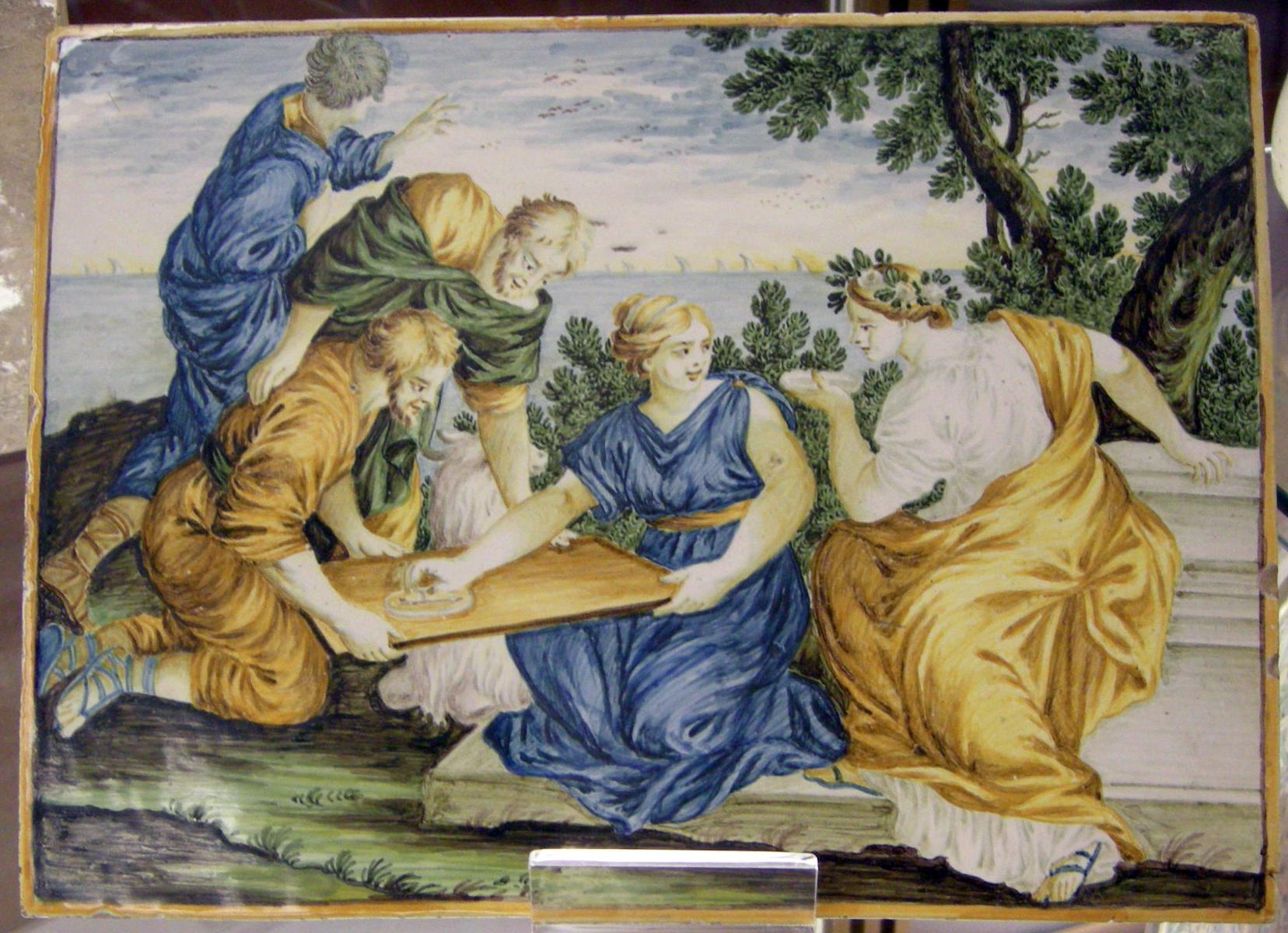 Palazzo Ducale di Urbino - Galleria Nazionale delle Marche - MIBAC This is a photo of a monument which is part of cultural heritage of Italy.